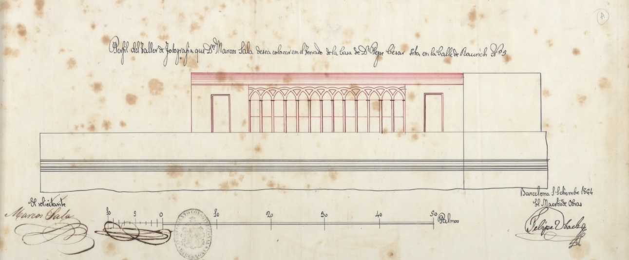 Plànol del taller Raurich 5 de Marcos Sala.